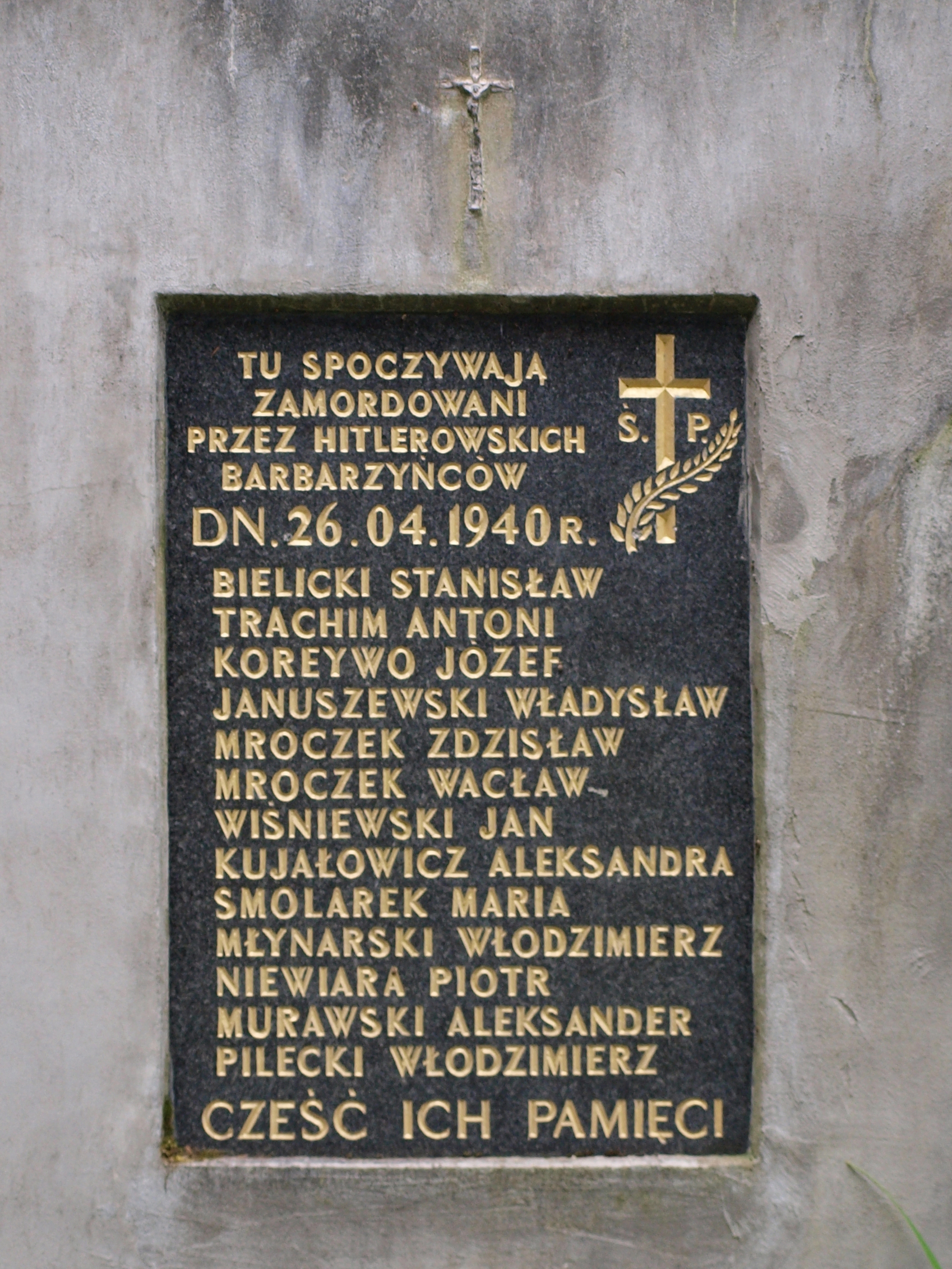 Mogiła zbiorowa Grupy Konspiracyjnej kpt. Bielickiego zamordowanych przez Niemców w dn. 26.04.1940 r. Suwałki - Szwajcaria